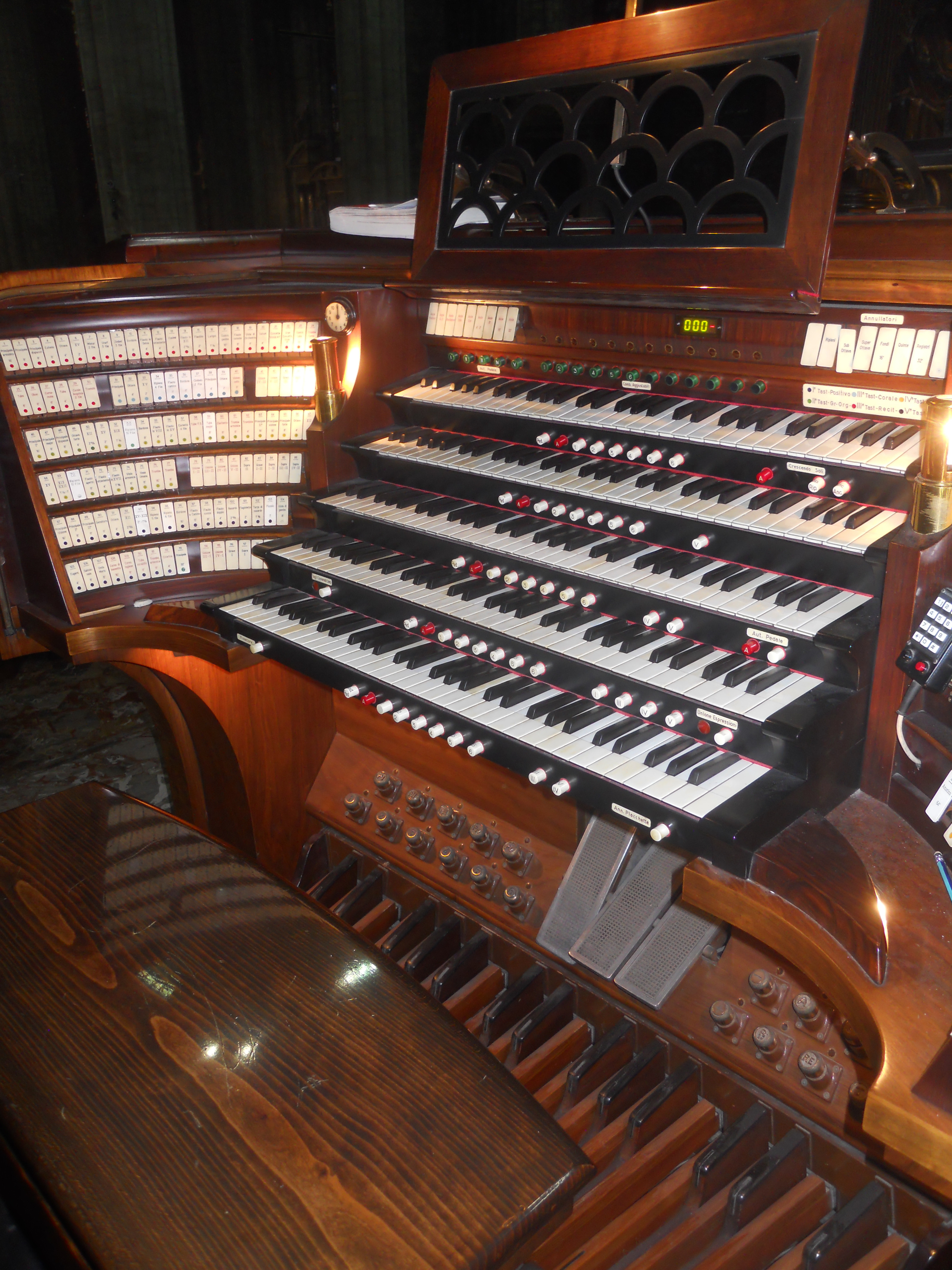 La consolle maggiore.